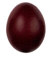 Très bel oeuf de la Marans